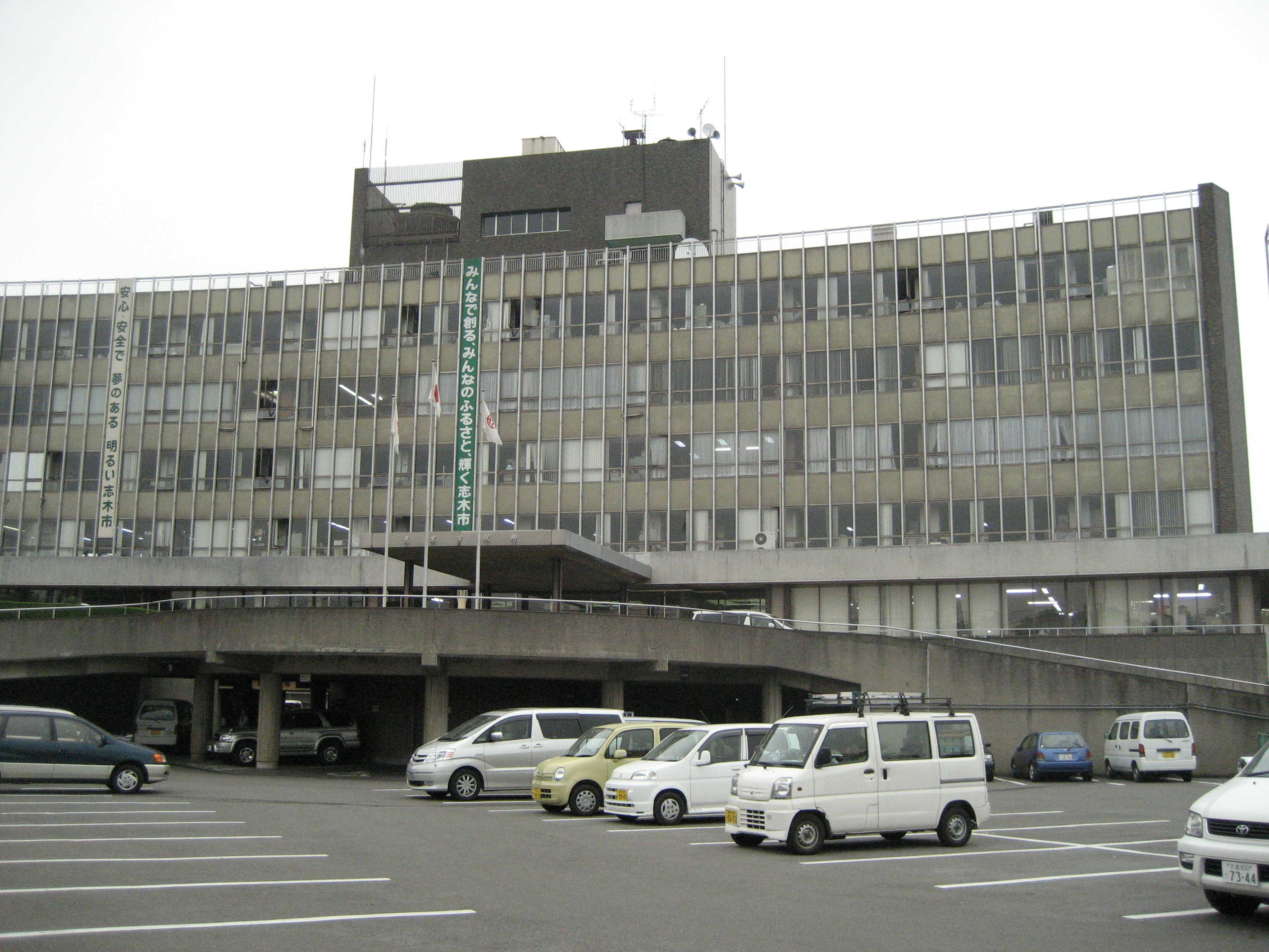 志木市役所